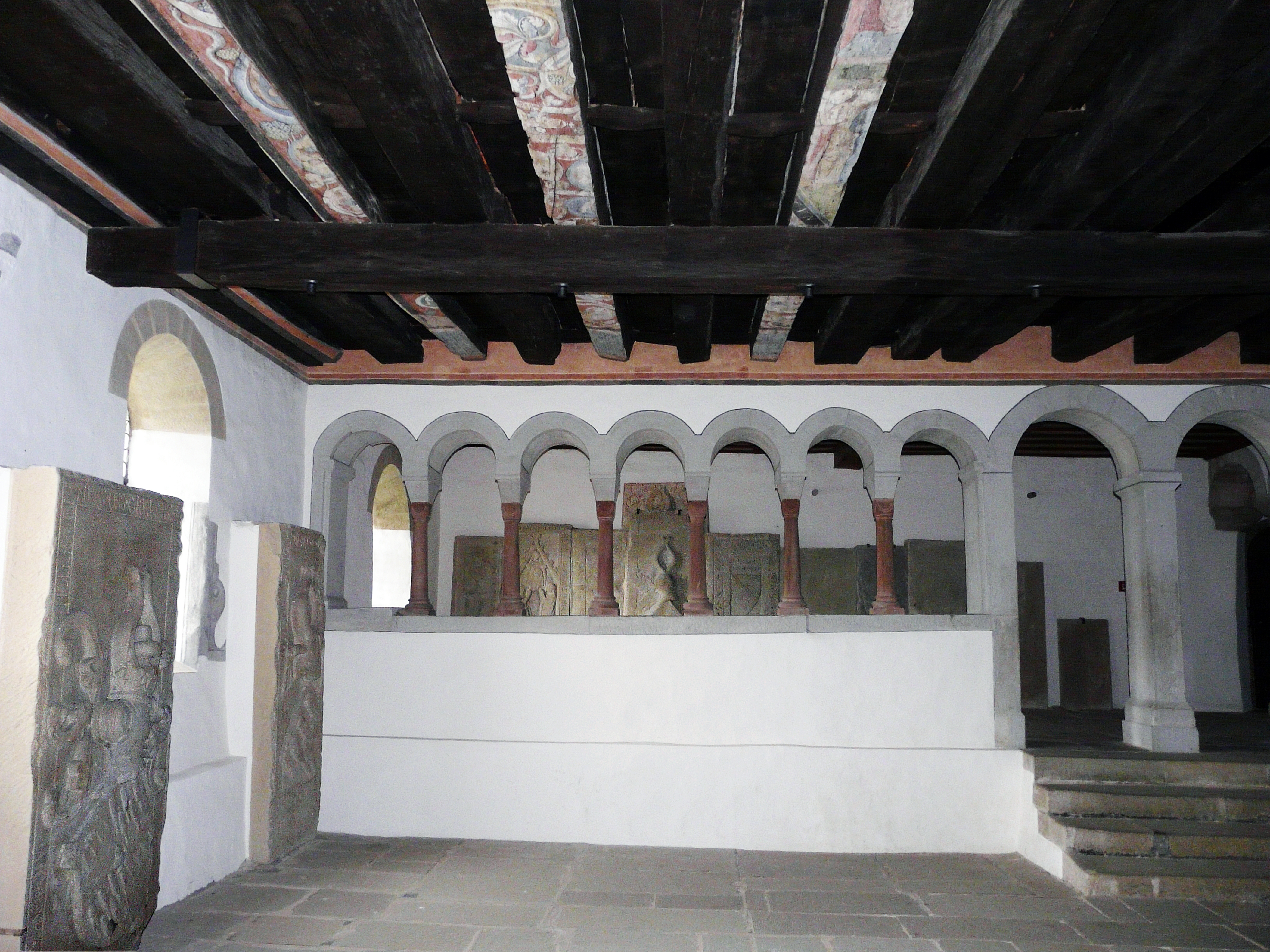 Шенкенкапелла. Зал собраний.